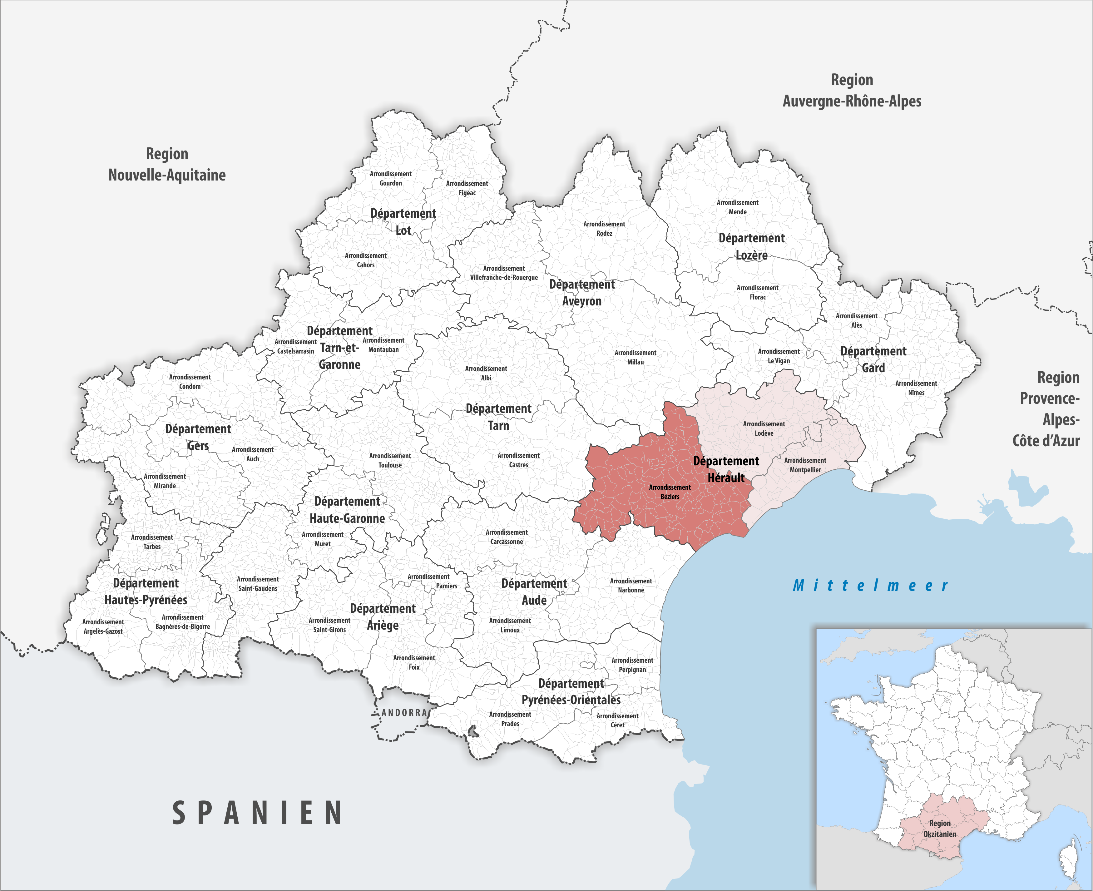 Lage des Arrondissements Béziers